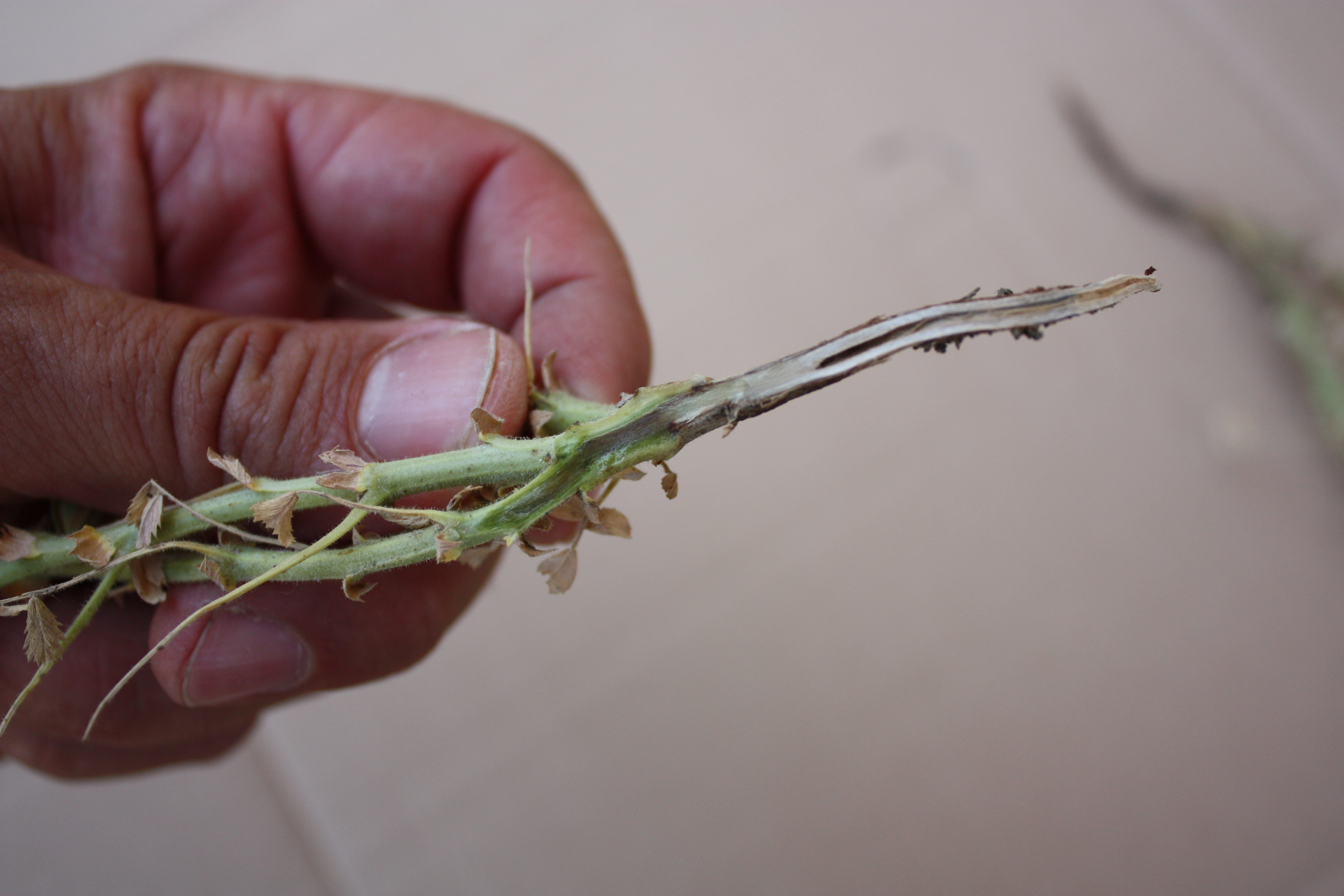 Sezione del fittone di una pianta di cece colpita da Fusarium solani f.sp. pisi. Imbrunimenti corticali determinati dalla colonizzazione delle ife fungine.